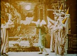 Mirando la Luna